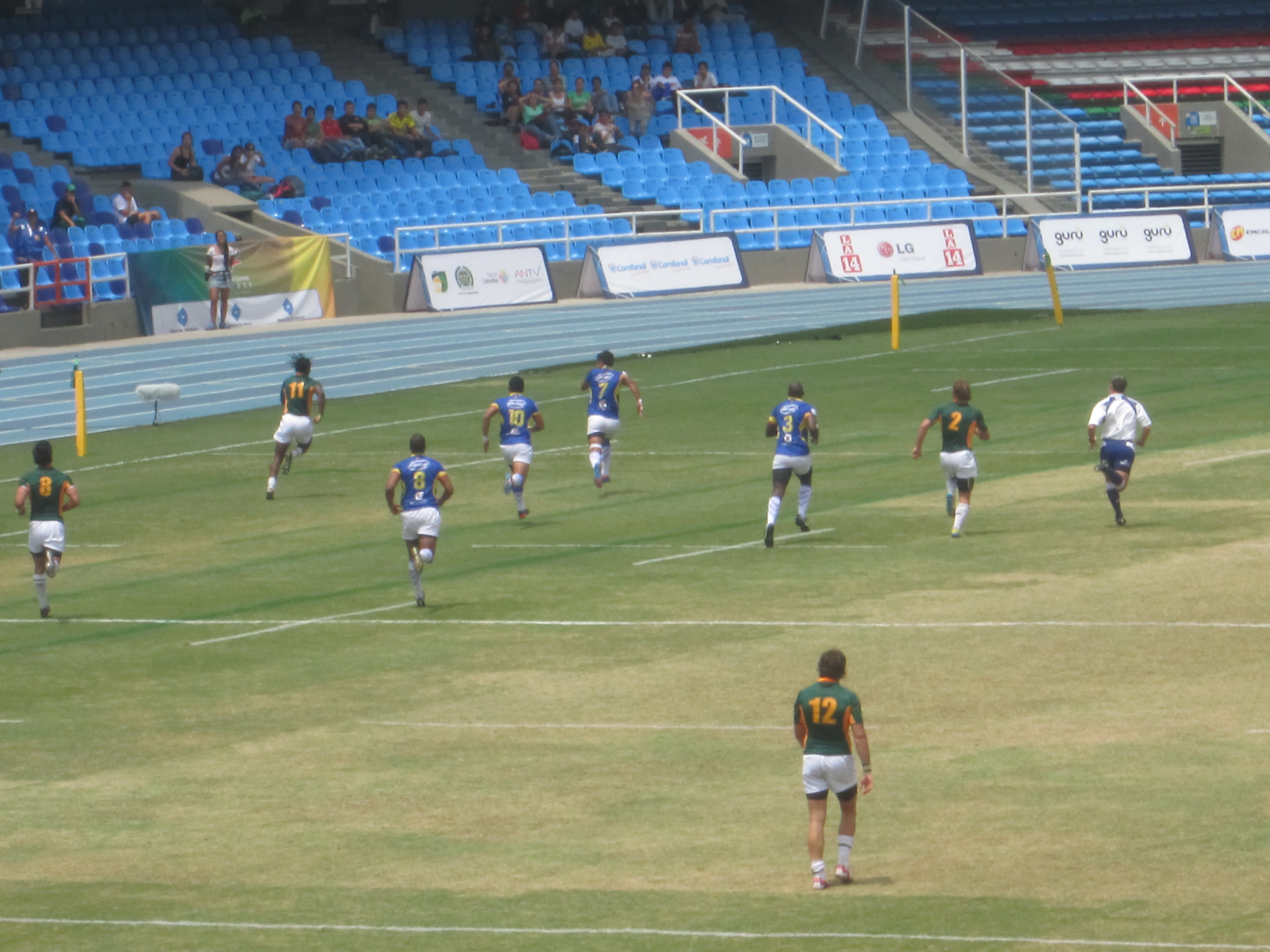 Colombia vs Sudáfrica - Rugby sevens - World Games 2013